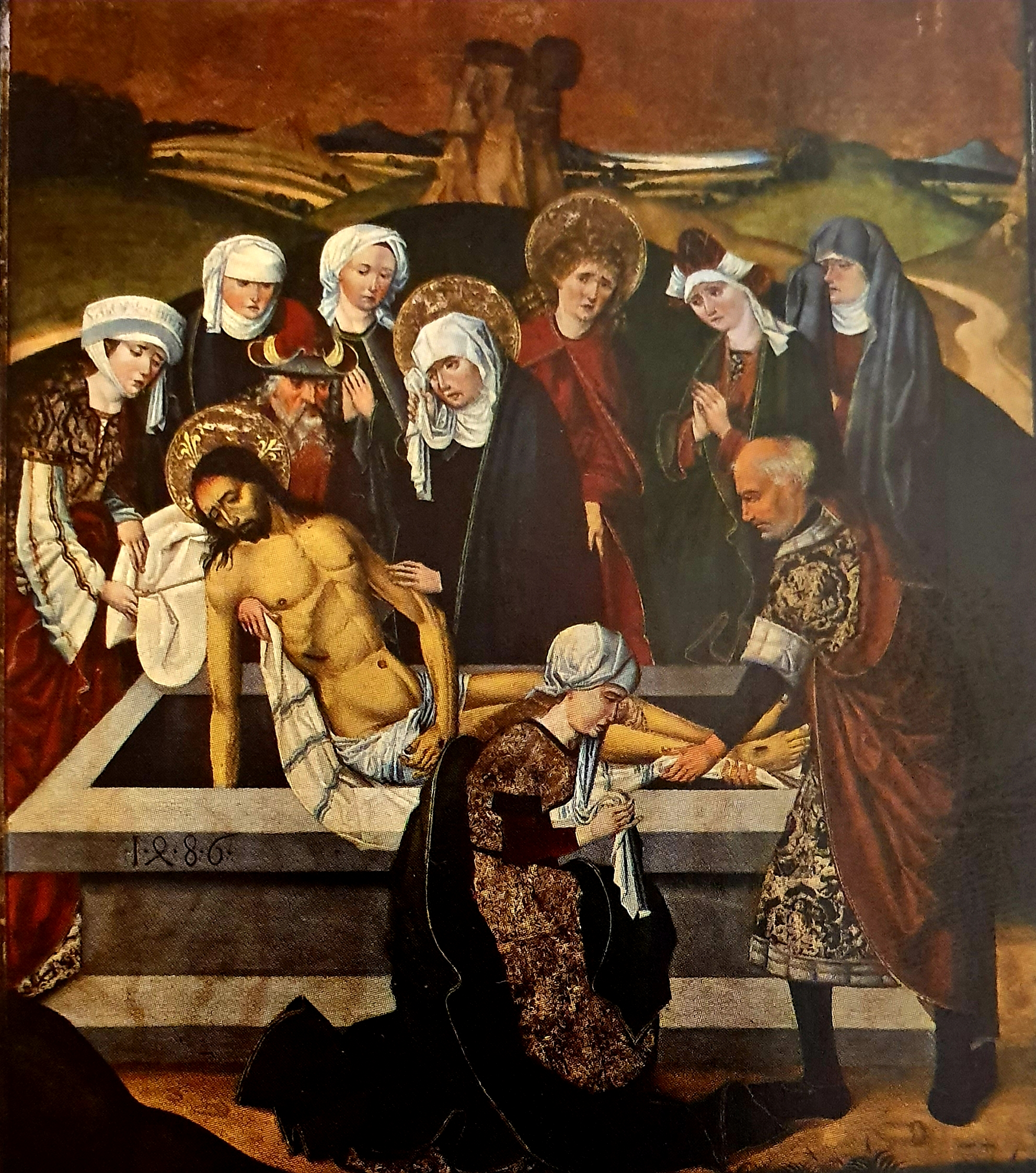 "Złożenie do grobu", kwatera z ołtarzu kościoła św. św. Pawła i Piotra w Strzegomiu, Mistrz lat 1486/1487, lata 1486-1487